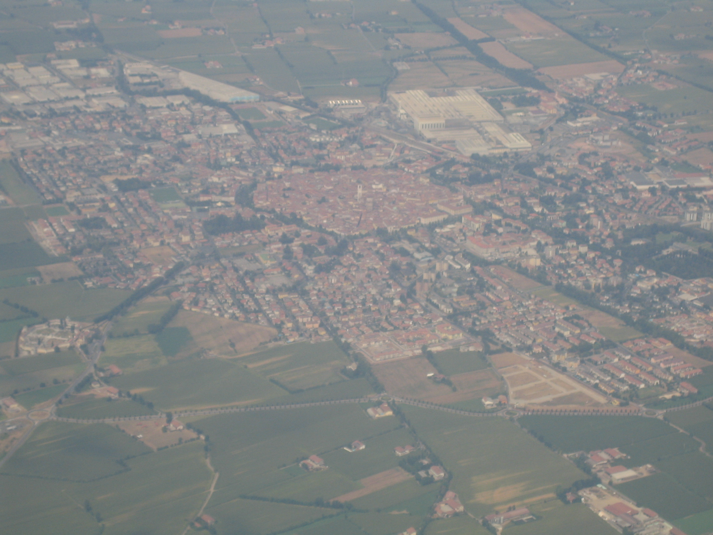 Chiari fotografata da un aereo